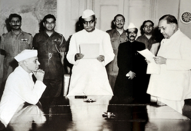 डॉ. बाबासाहेब आंबेडकर राष्ट्रपती राजेंद्र प्रसाद याॅच्याकडून कायदामंत्री पदाची शपत घेताना. समोर नेहरू बसलेले.